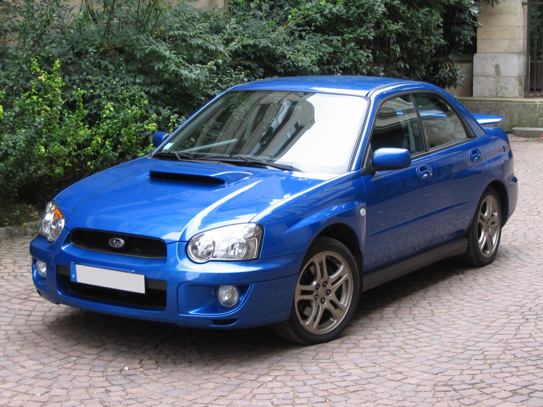 Subaru Impreza WRX (2005), reine de rallyes en tenue de ville.